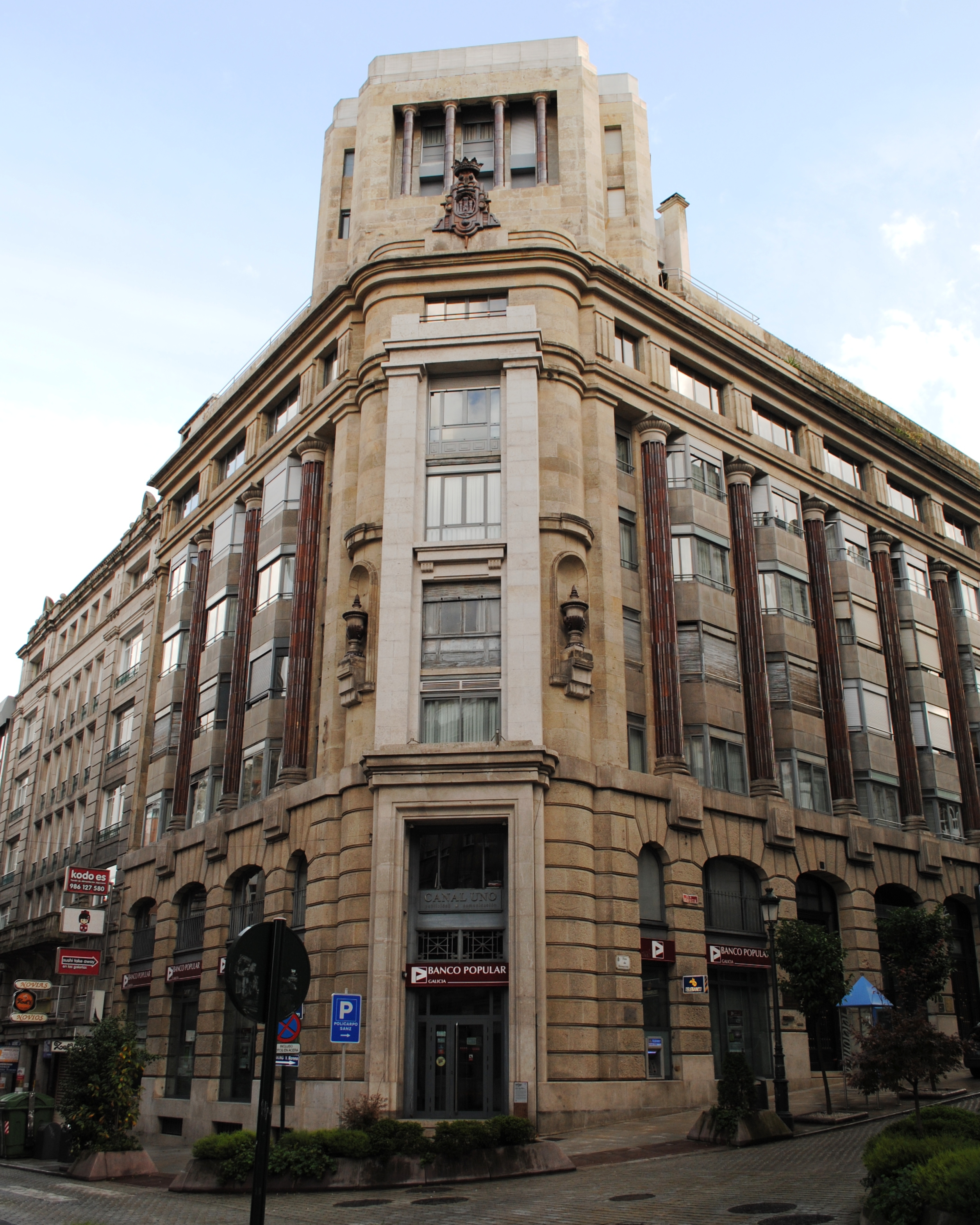 Banca Viñas Aranda, Antonio Palacios, 1941